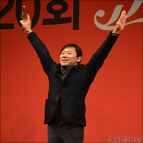 제6회 코카-콜라 체육대상 최우수선수상 수상자 이주형